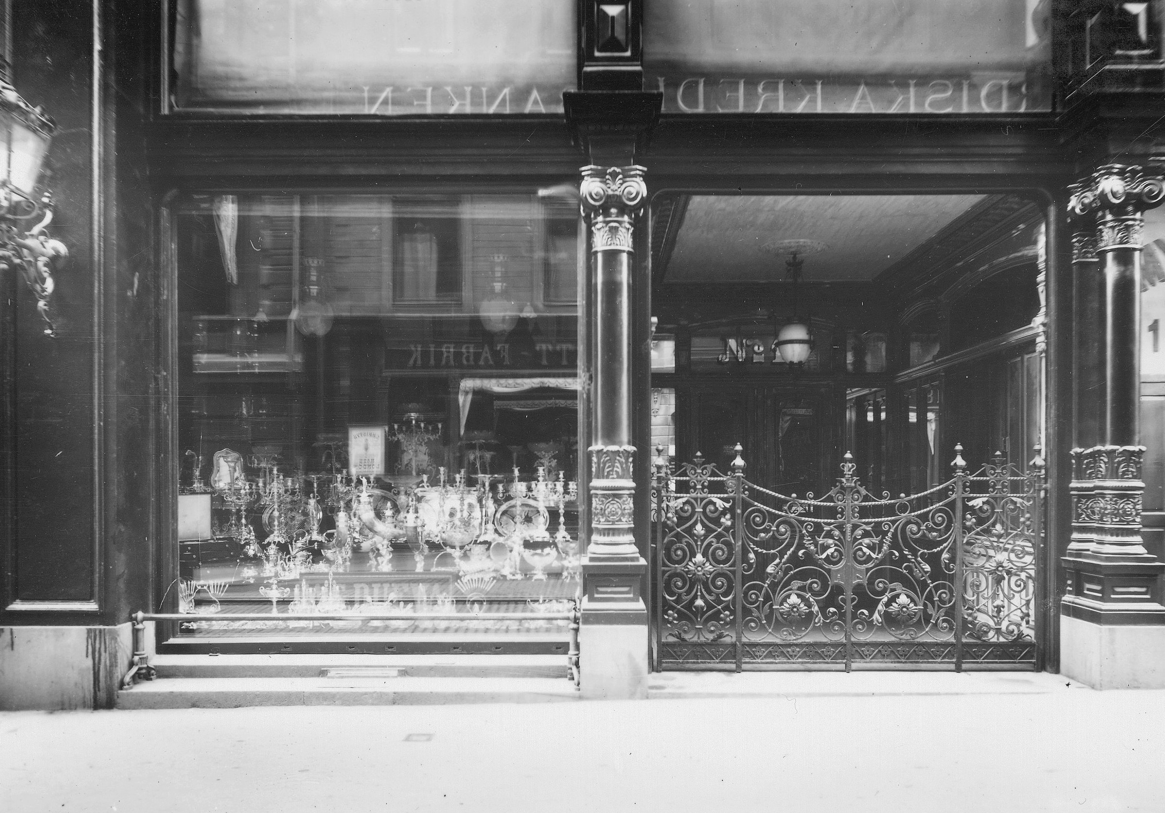 A G Dufvas skyltfönster Drottninggatan 11